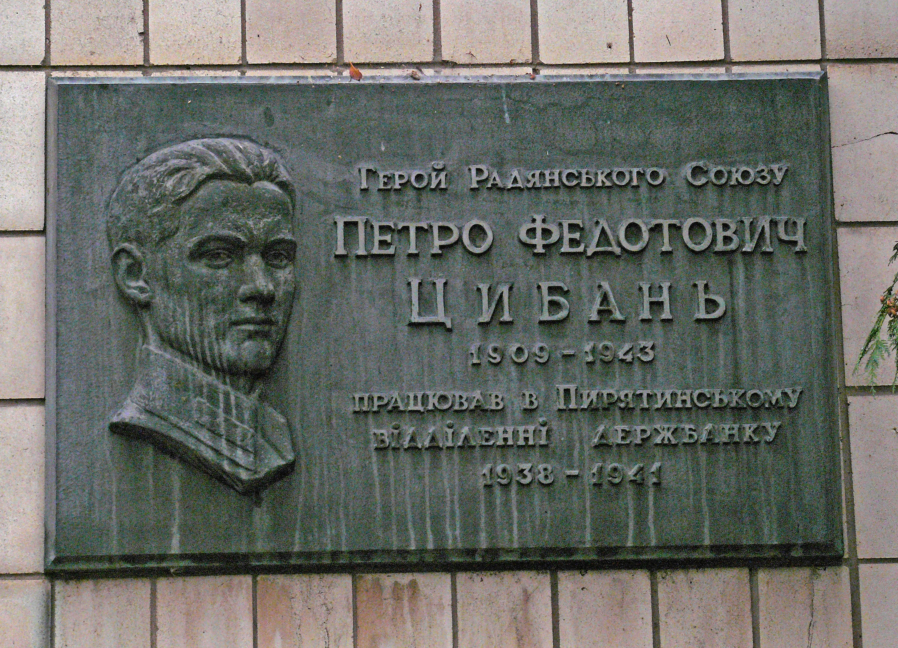 Меморіальна дошка в пам’ять Героя Радянського Союзу П.Ф.Цибаня., Пирятин, Леніна вул., 52